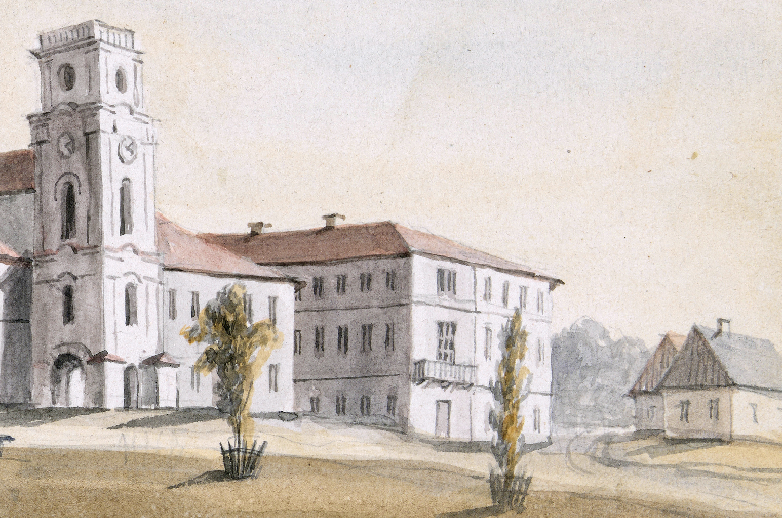 Беларуская (тарашкевіца): Менск (Miensk), пляц Высокі Рынак (plac Vysoki Rynak). Катэдра і калегіюм езуітаў.